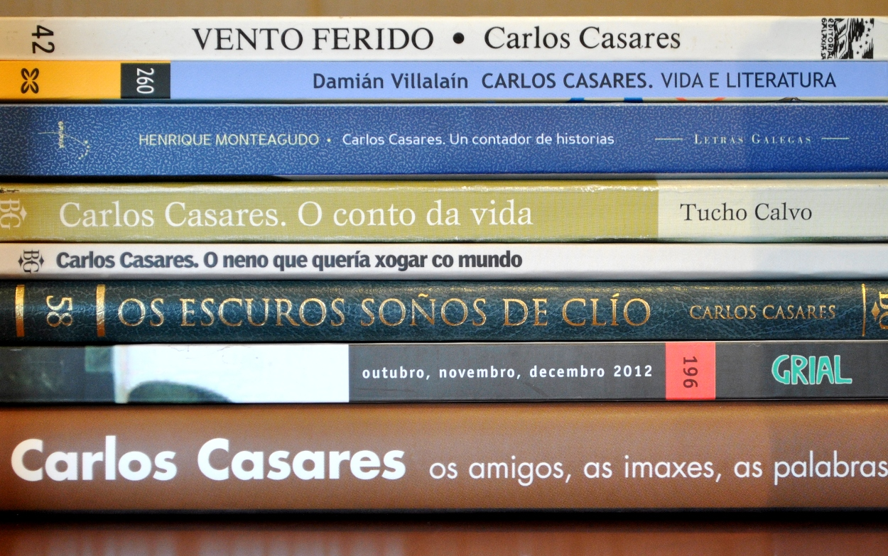 Algúns lombos de libros de ou sobre Carlos Casares Mouriño